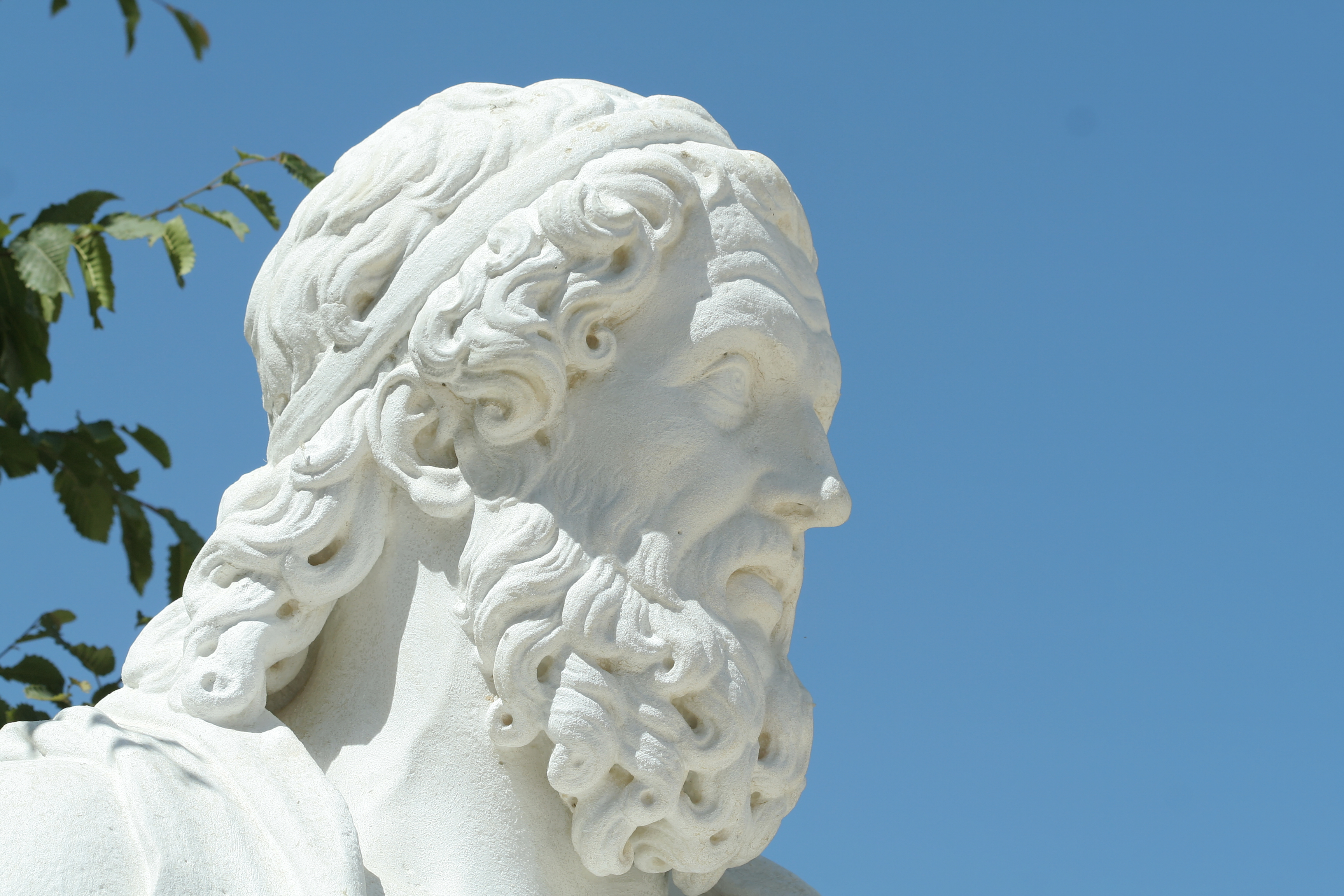 Parc de Versailles, Rond-Point des Philosophes. Isocrate, Pierre Granier (1684-1688) MR1870